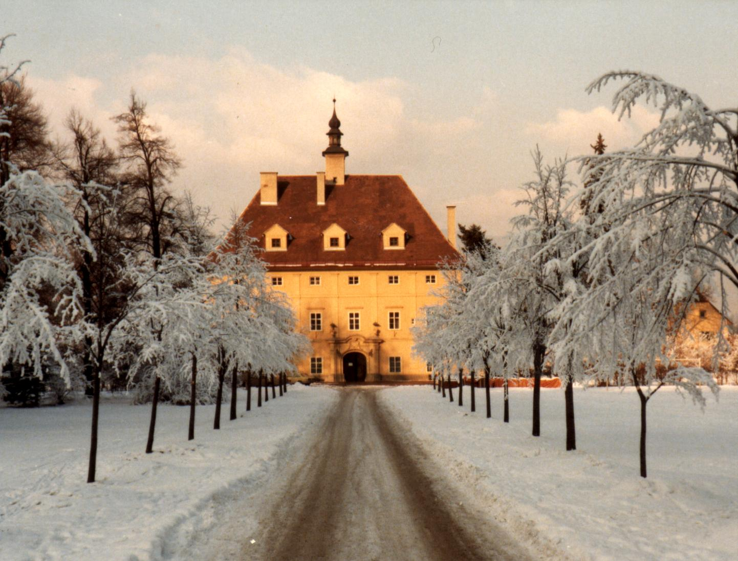 Anblick Schloss Lichtenstein von Süden